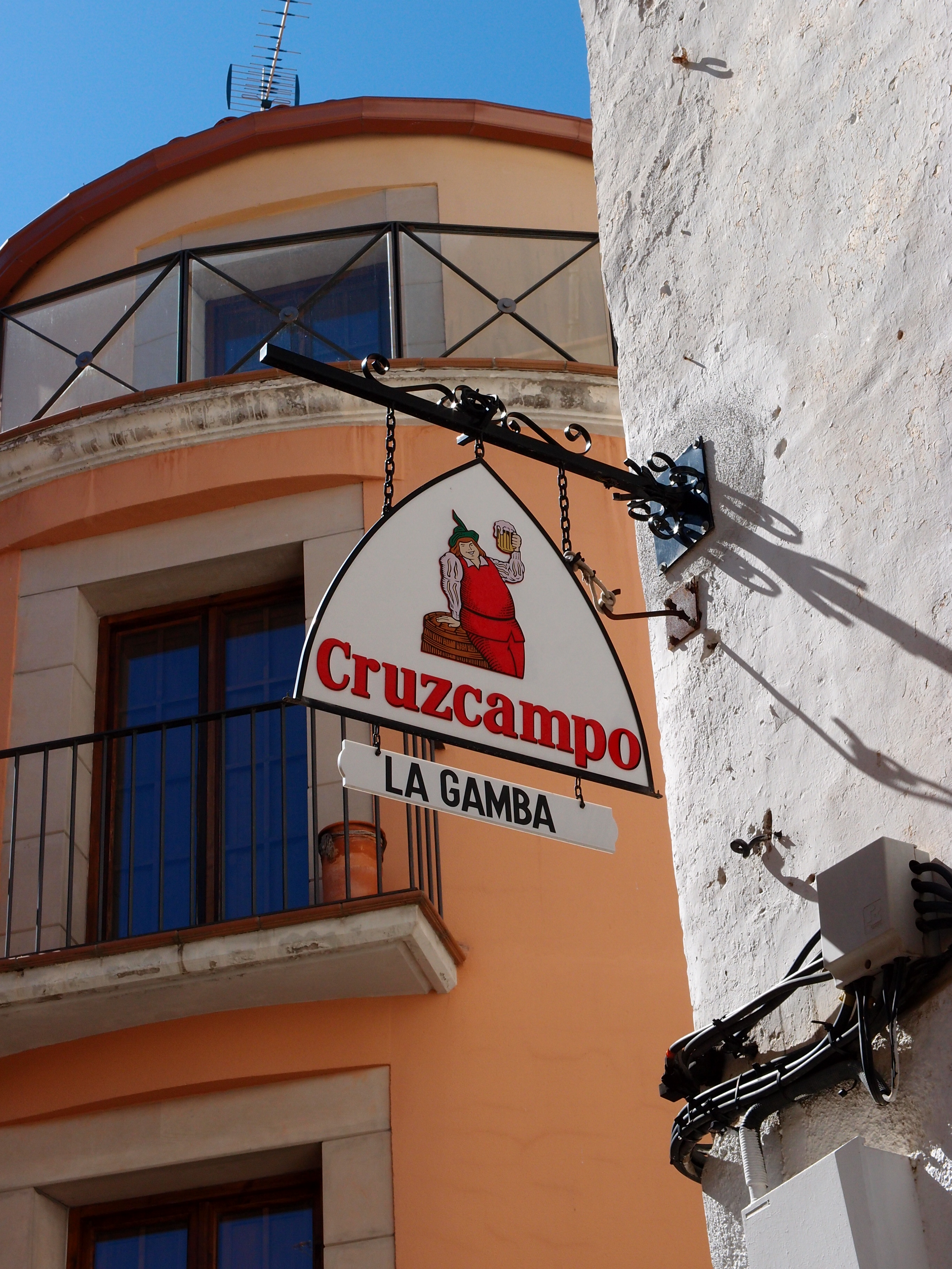 Cruzcampo Werbeschild an einer Bar in Tossa de Mar - Katalonien/Spanien Datum: 20.09.2011 Urheber: M. Pfeiffer alias Gordito1869 Quelle: Privates Fotoarchiv des Urhebers